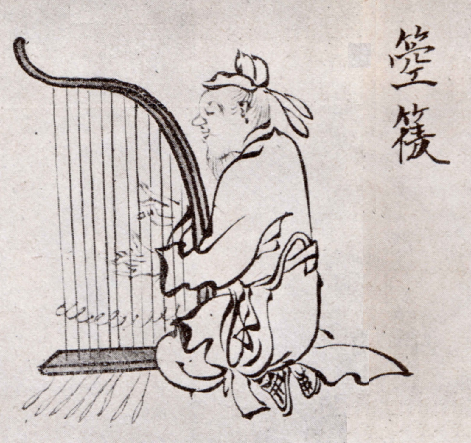 昭和2年に刊行された『日本古典全集 信西古楽図』から。